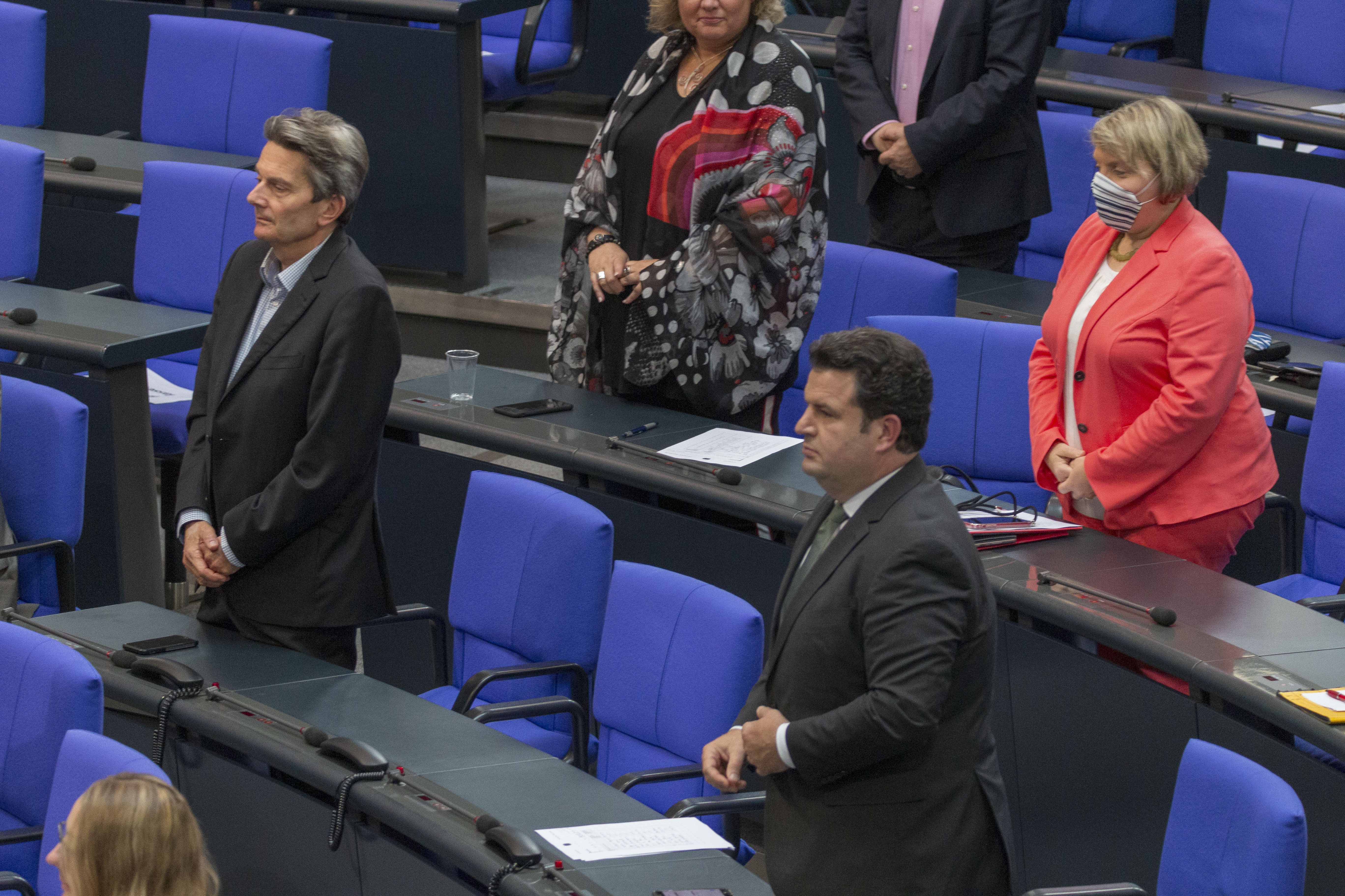 Verabschiedung der Grundrente während der Plenarsitzung des Deutschen Bundestages am 2. Juli 2020 in Berlin.